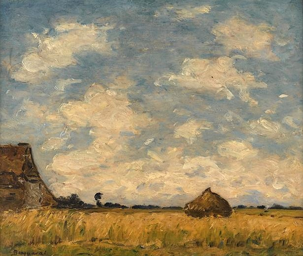 Le Champ de blé, huile sur toile de Louis Braquaval (1854-1919), musée Boucher de Perthes, Abbeville (Somme, France).